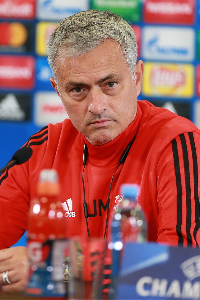 Пресс-конференция и тренировка «Манчестер Юнайтед»